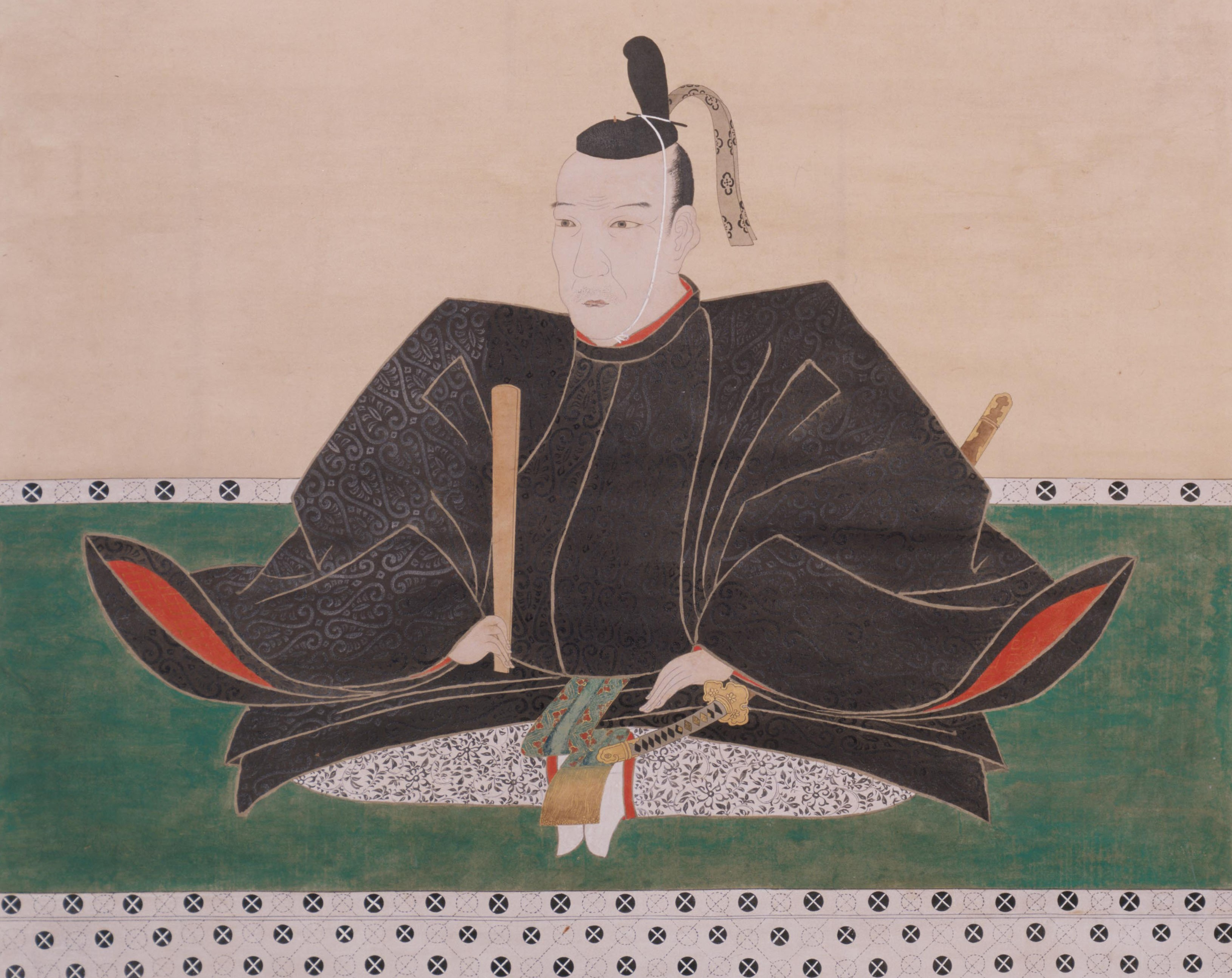 吉川広家の肖像。